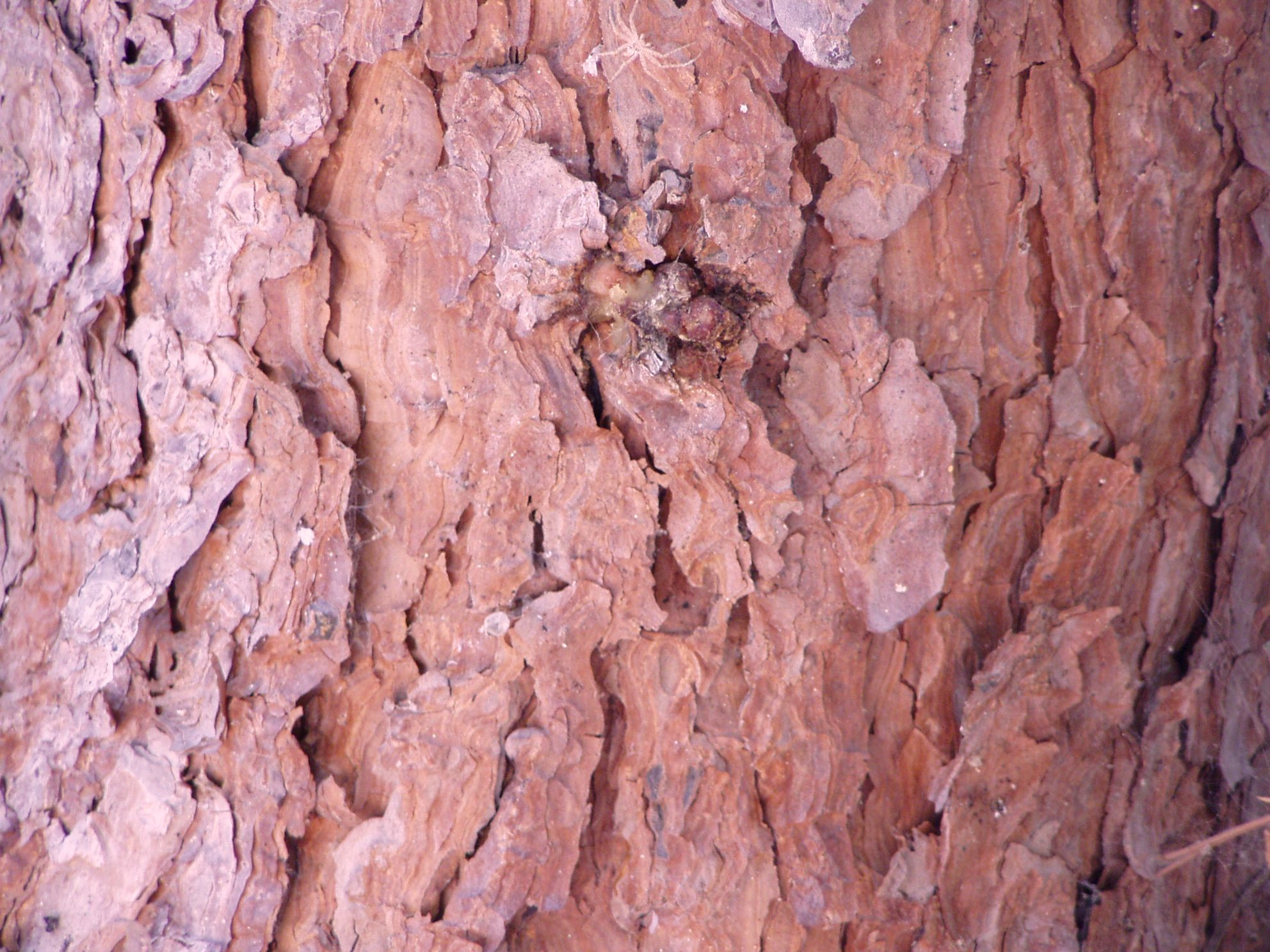 Pinus halepensis.